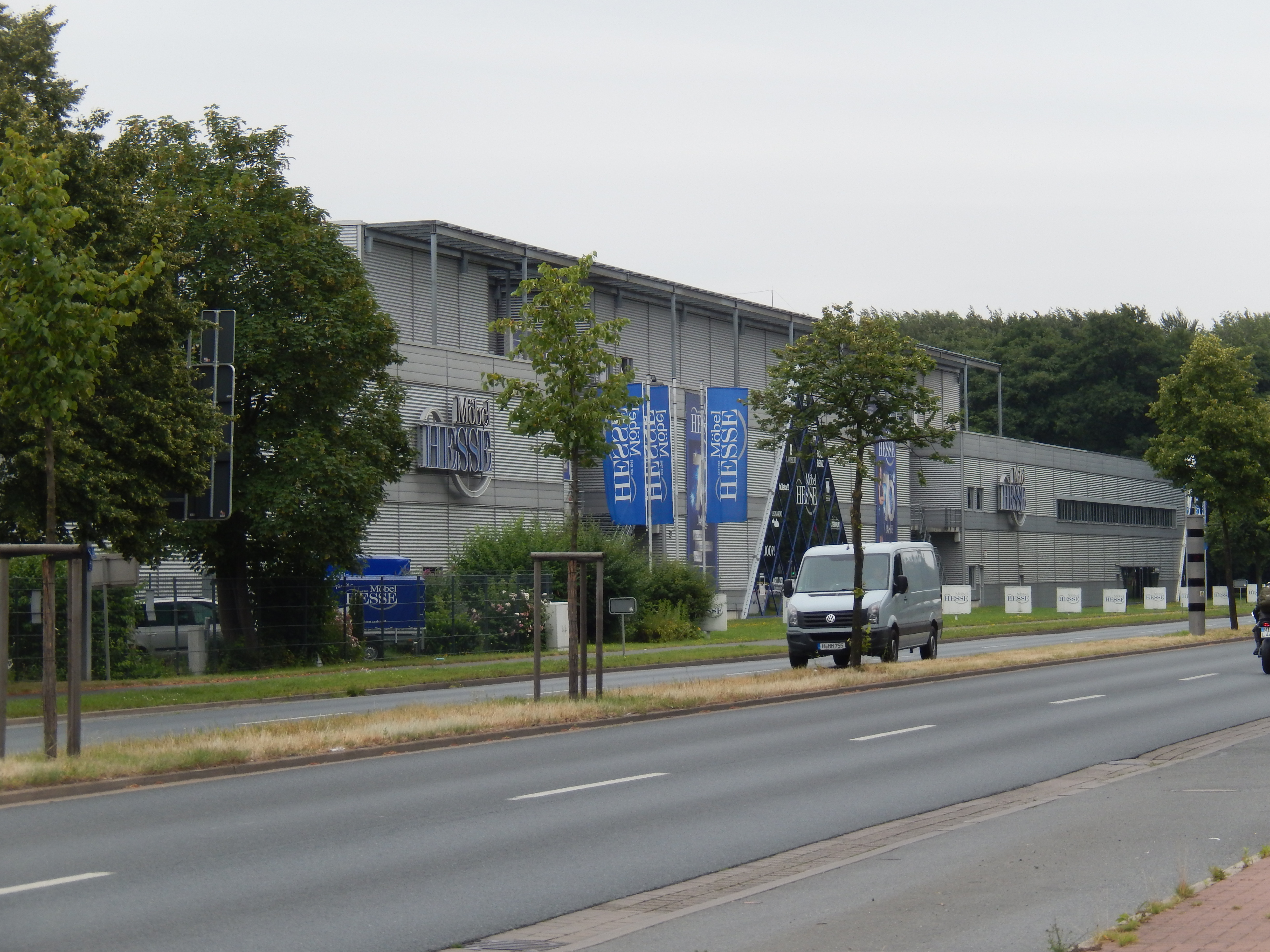 Möbel Hesse an der B6 in Berenbostel